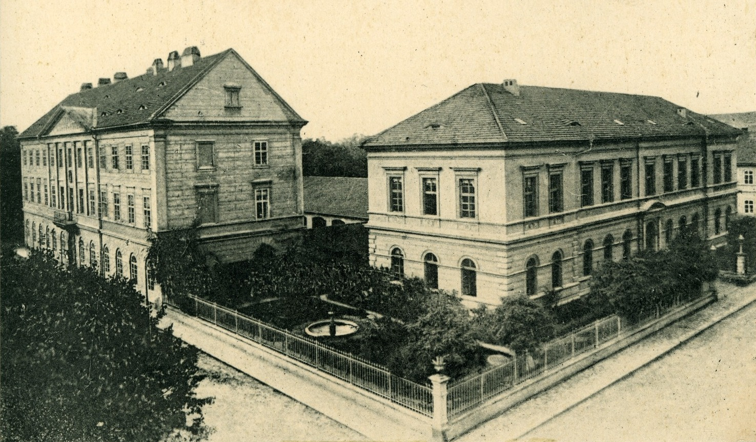 Theresienstadt; Rathaus - Schule This postcard is from publisher Brück & Sohn in Meißen ( postcard has a unique number 10695 and is available in a higher resolution at the publisher. This images was uploaded in a cooperation project between Wikipedians and the publisher.